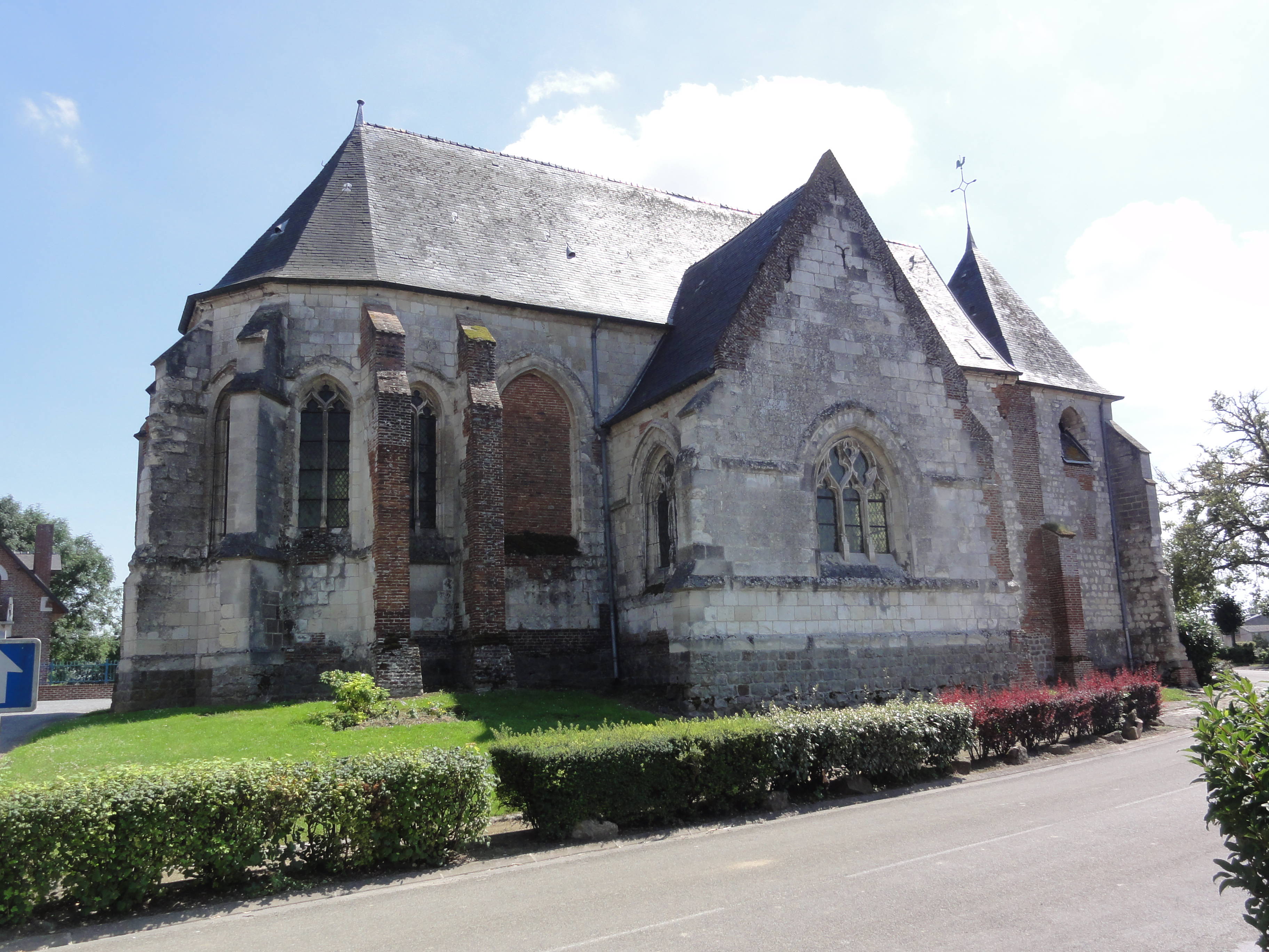 Pleine-Selve (Aisne) église